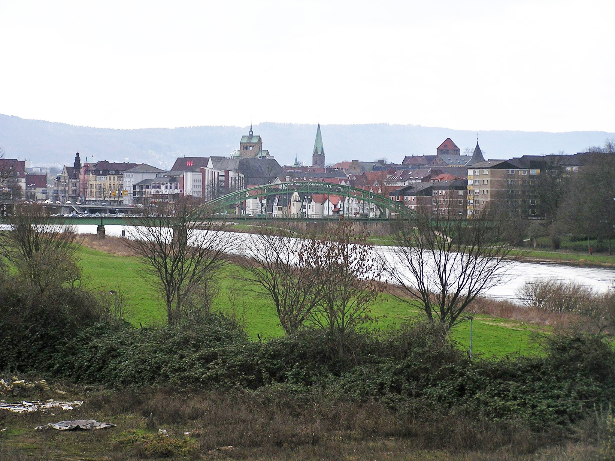 Blick von Norden über die Weser auf die in der norddeutschen Tiefebene liegende Stadt Minden. Im Hintergrund das Wiehengebirge.